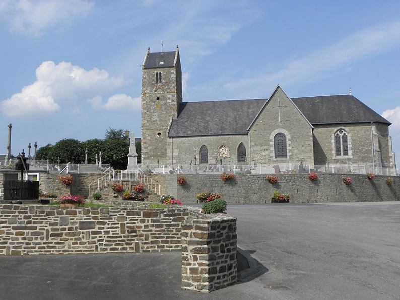 Église paroissiale de Juilley (50).